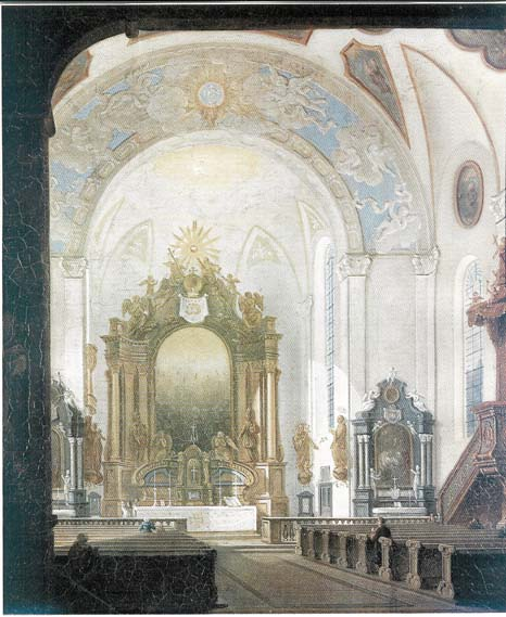 St.-Josephs-Kirche (St. Pauli), Innenansicht vor der Zerstörung, gemalt 1. Hälfte, 19. Jahrhundert